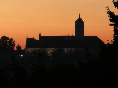 Вид на монастир оо. Бернардинів з півдня.